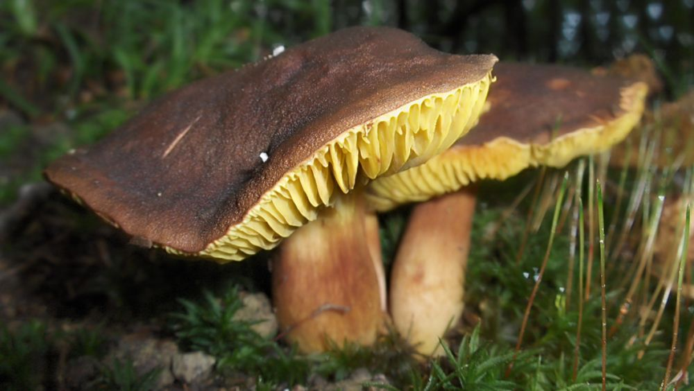 Aranysárga lemezestinorú